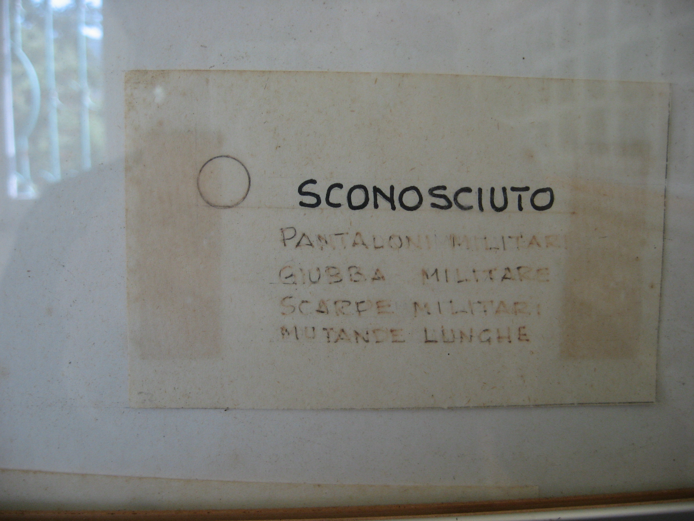 autore della foto: Fioravante Patrone foglio che riporta le informazioni note di un ucciso, non identificato, nella strage del Turchino